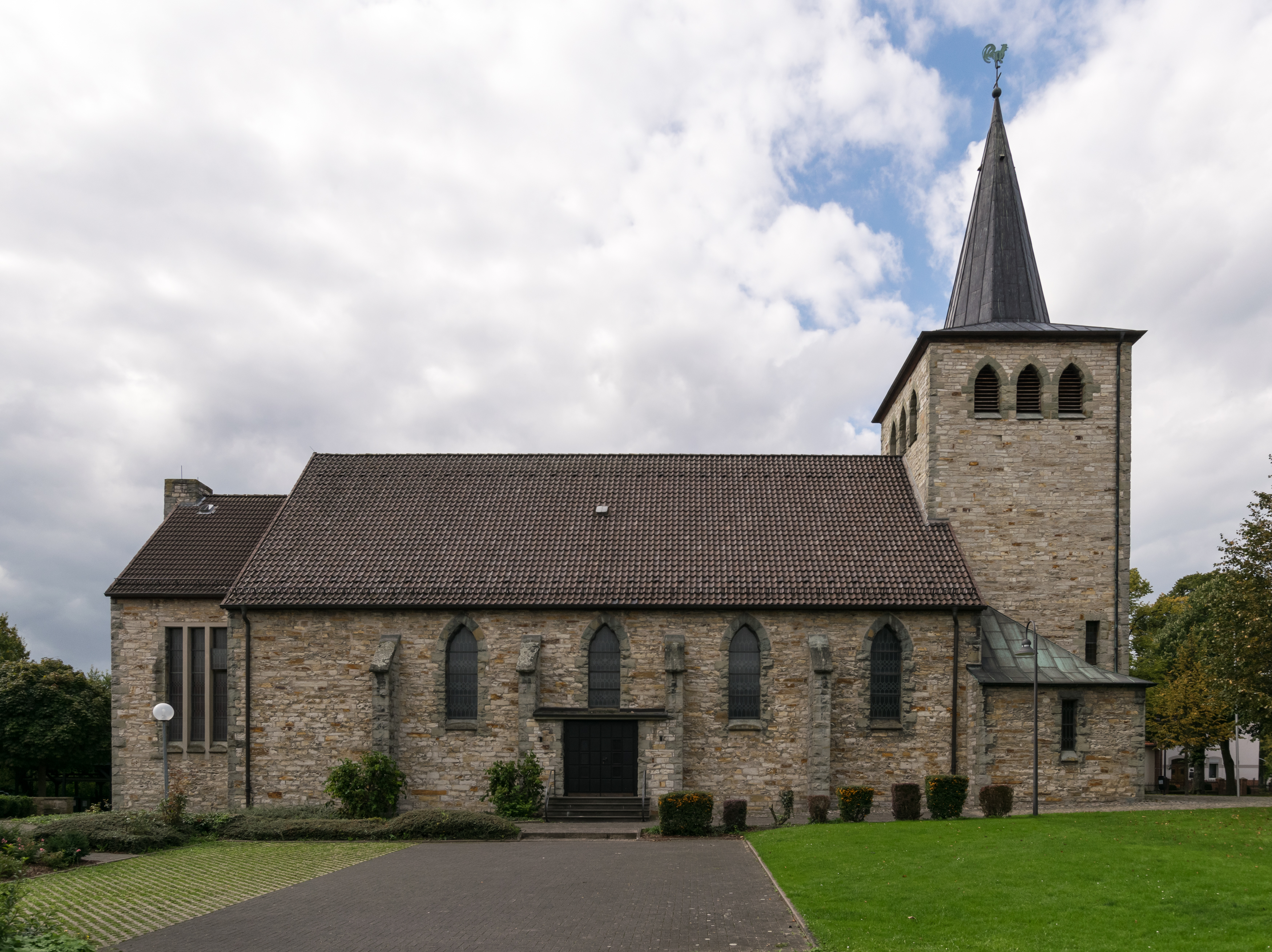 Katholische Pfarrkirche St. Alexius in Paderborn-Benhausen